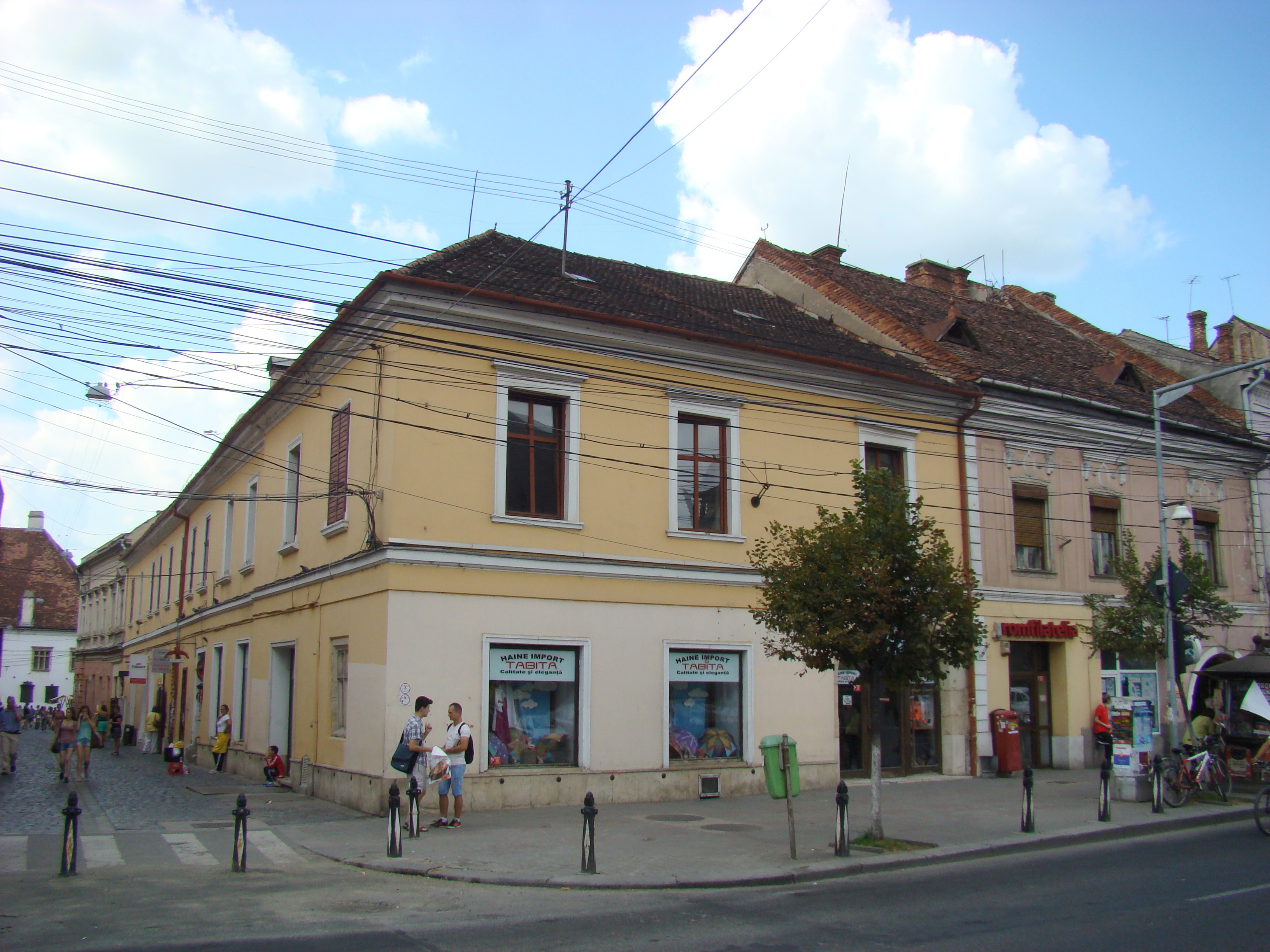 Clădire monument istoric: Str. Matei Corvin 2 și Piața Unirii nr. 18